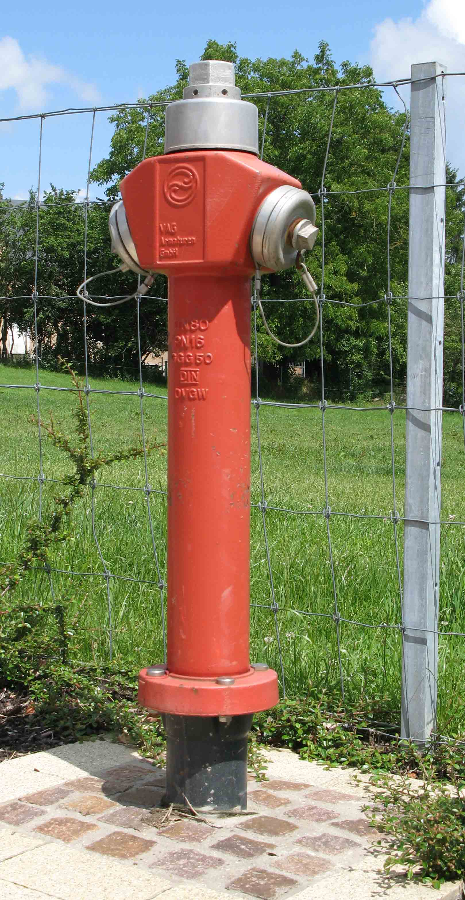 En Hydrant.